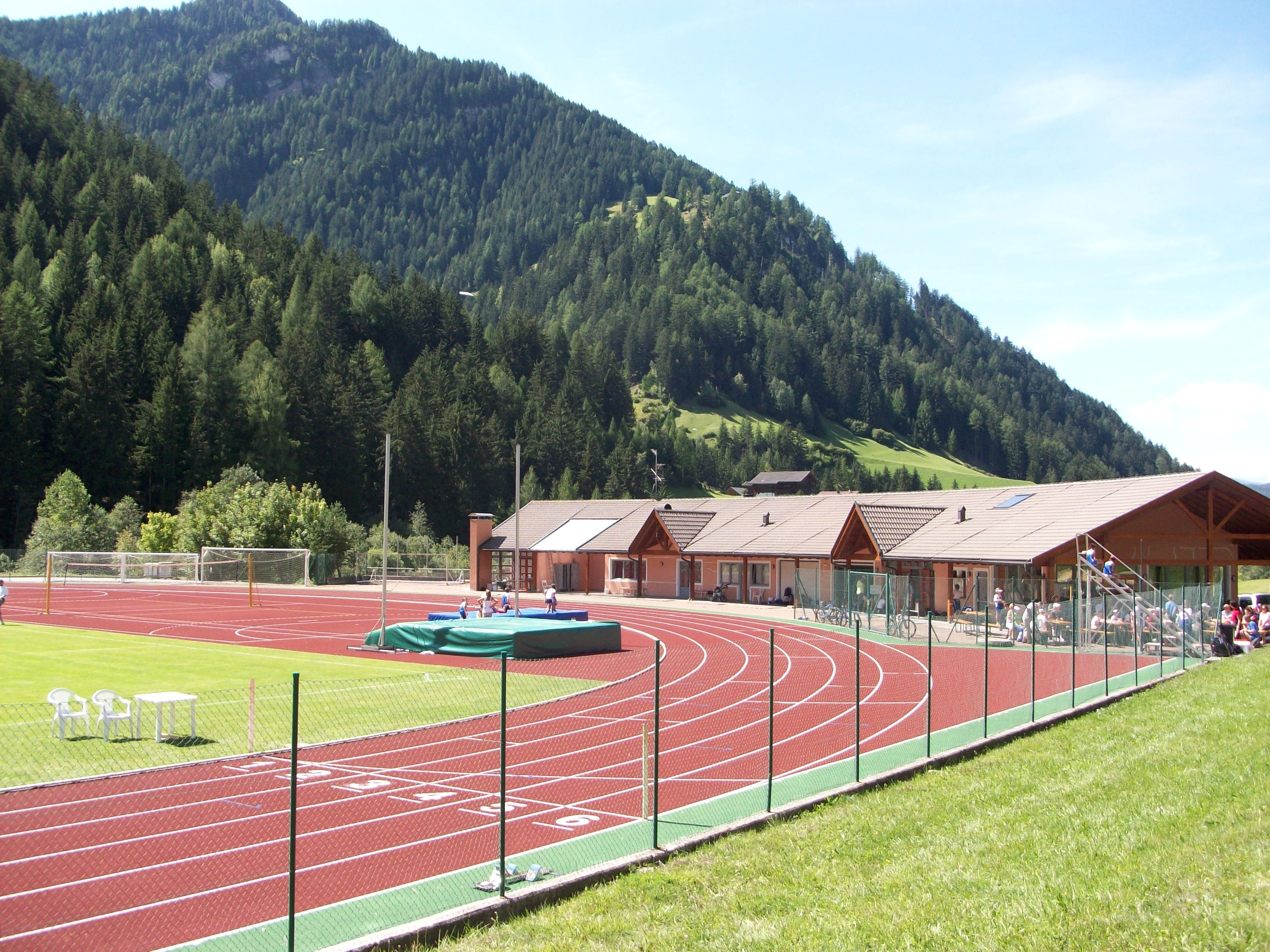 Mulin da Coi